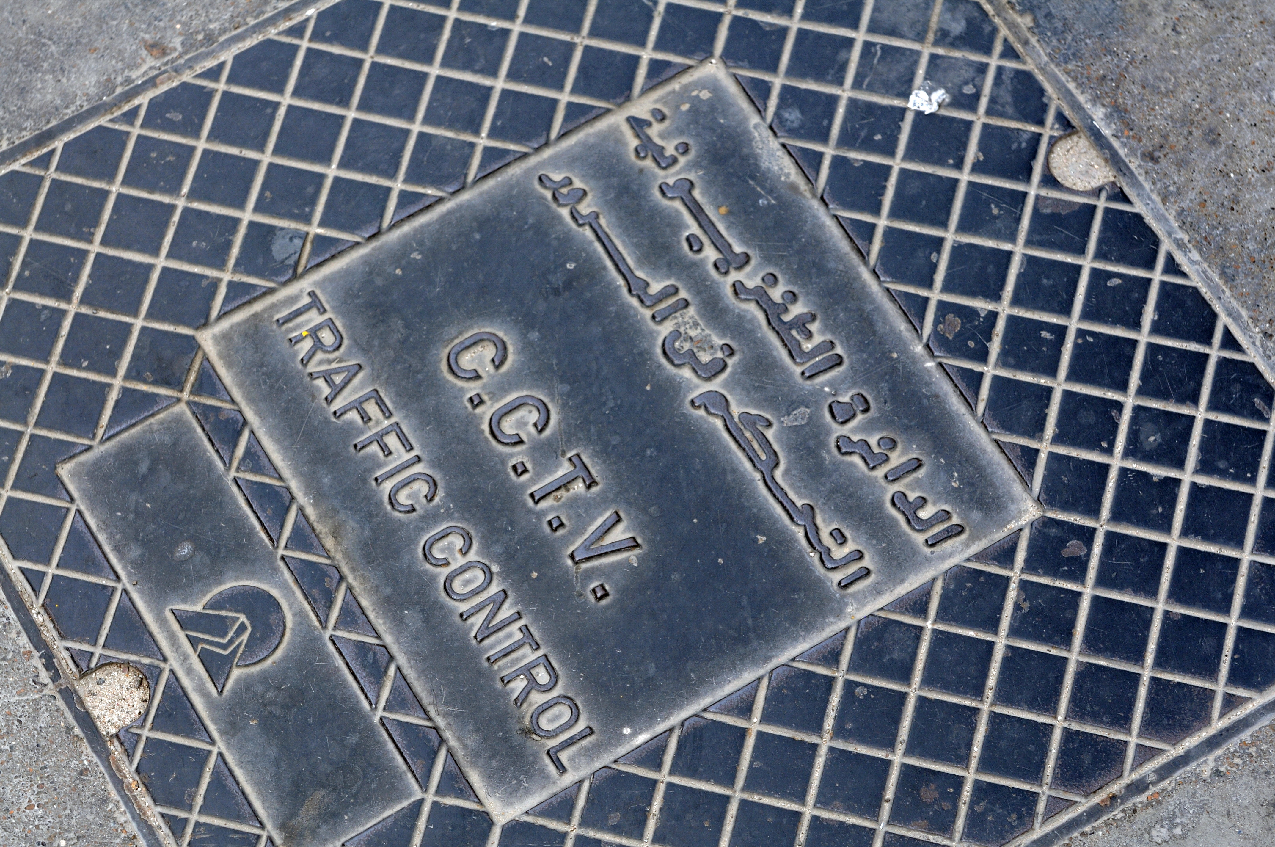 travel to Wikimania 2013: Abu Dhabi